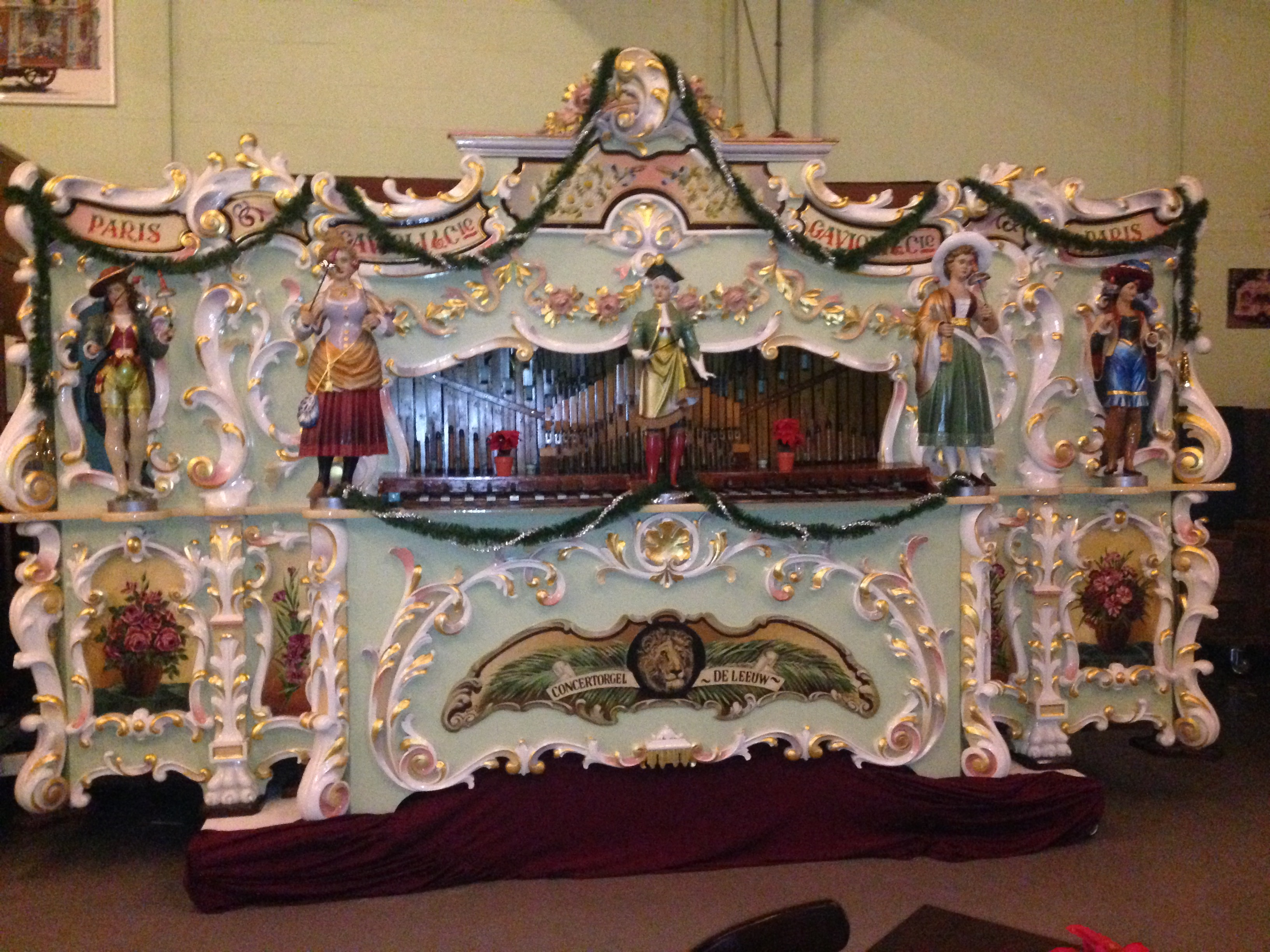 Draaiorgelmuseum, Haarlem, Netherlands